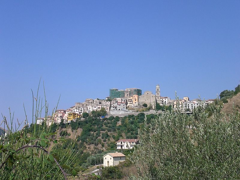 Vue du village de Savoia di Lucania